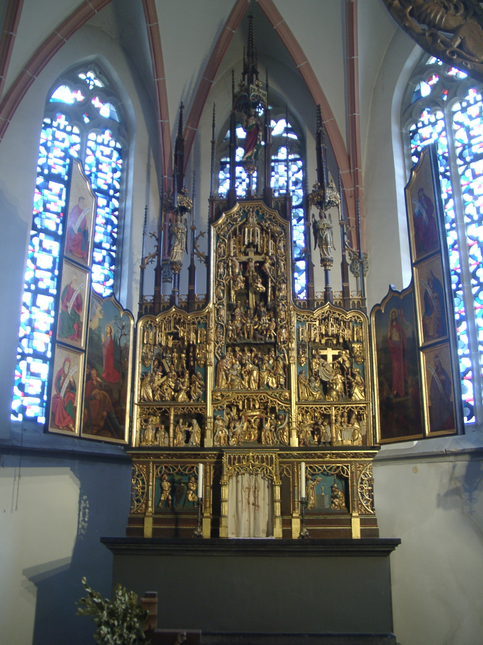 Kirche in Siersdorf